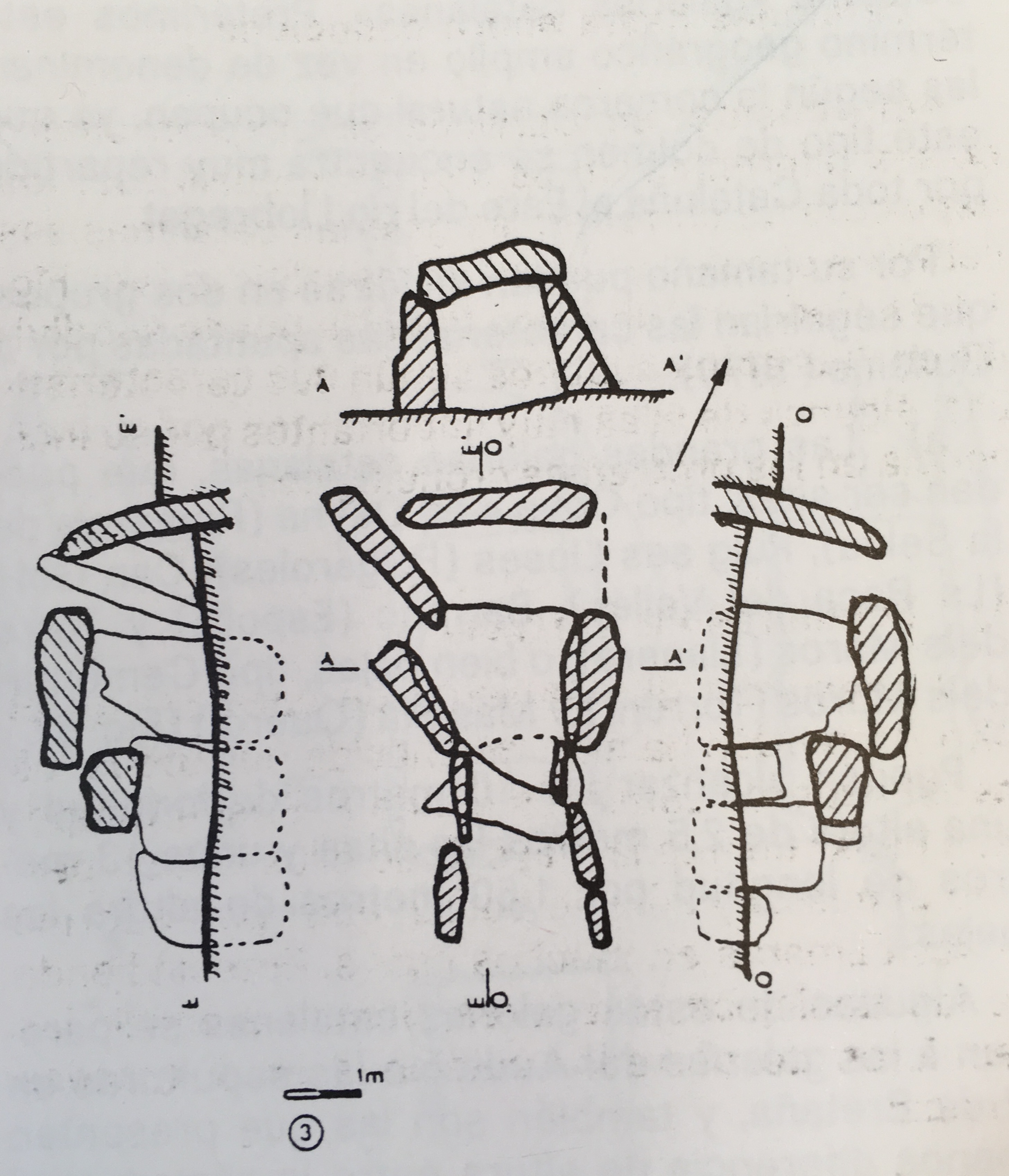 cabana d'Arqueta